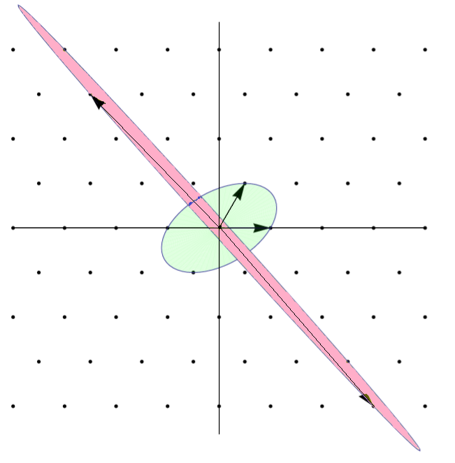 A lattice with unit balls for two different